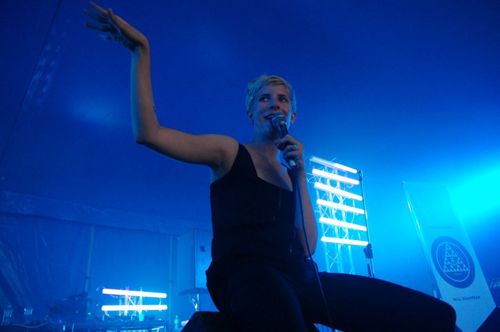 Yacht @ Wellington Square (1/3/2009)